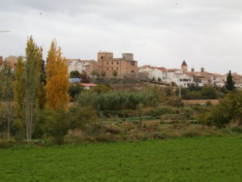 Novallas Esta fotografía ha sido realizada por jesbaq. Aparece también en otras páginas web como Fotos de Novallas mantenidas por jesbaq.